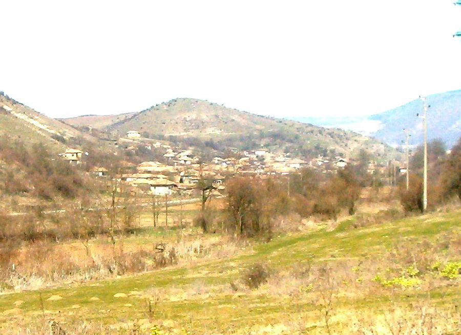 Поглед към село Крепча, Опаченско от пътя за село Голямо Градище. Фото: Вл. Стойков.